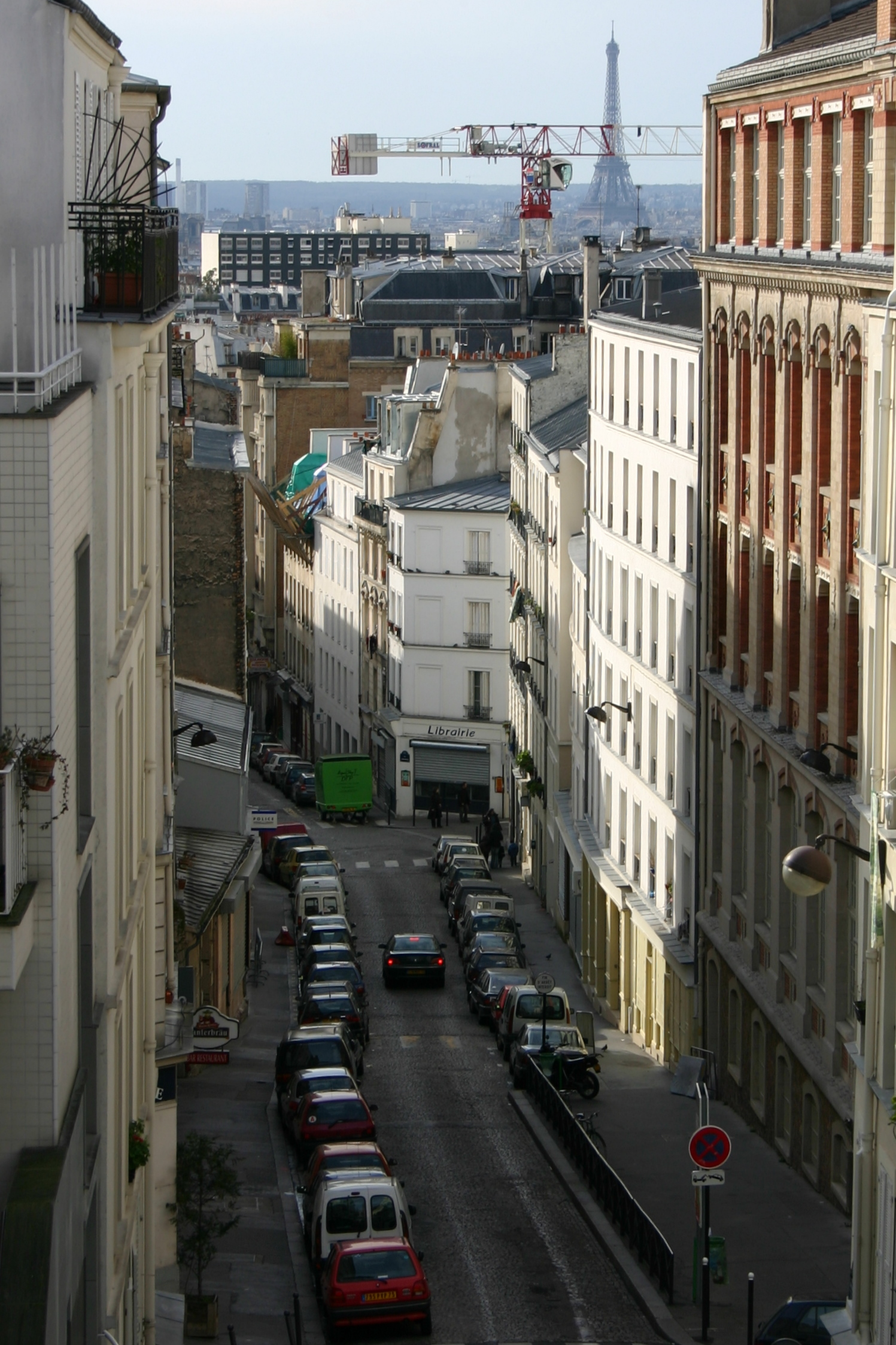 Rue Ramponeau photographiée depuis le parc de Belleville